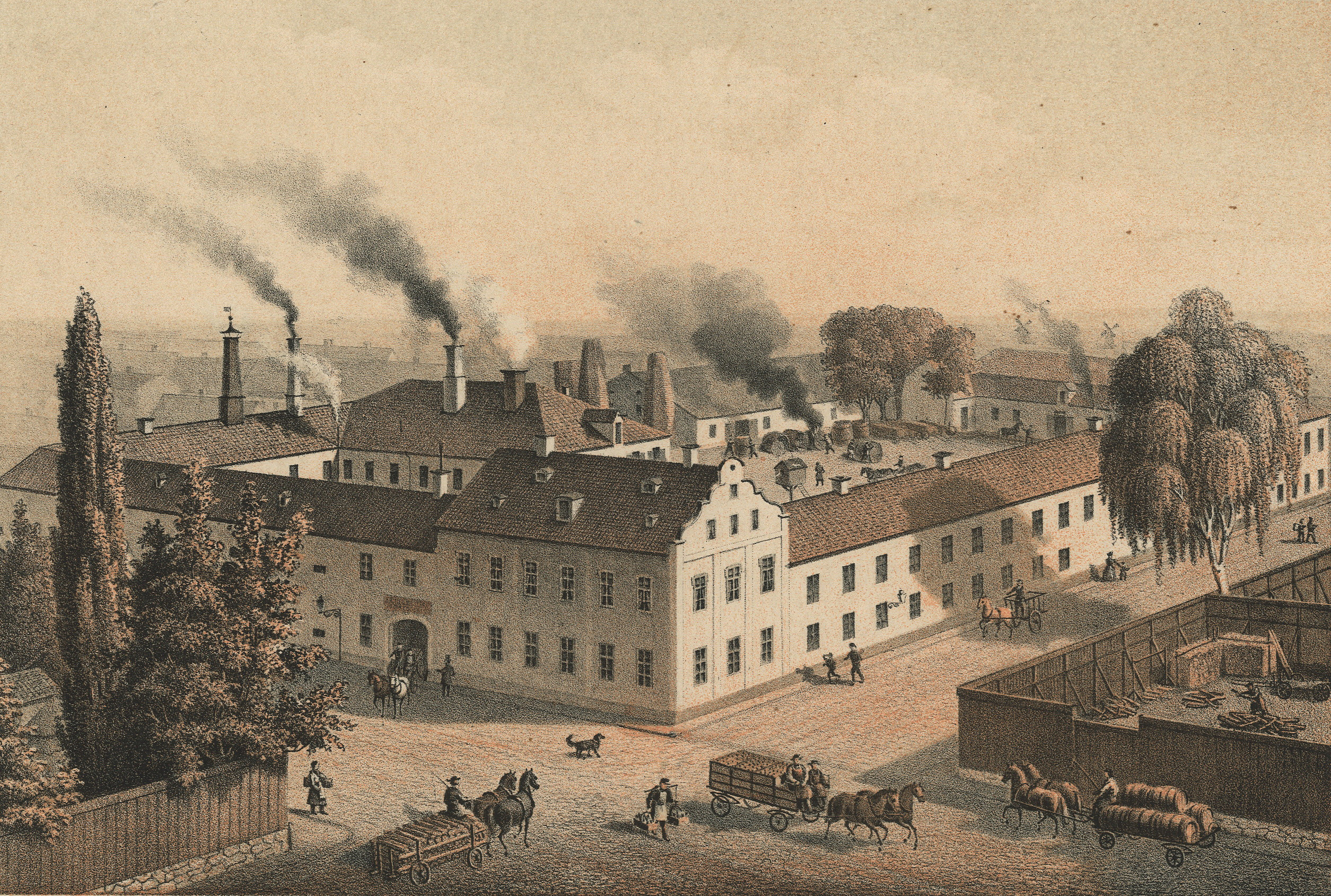 F.R. Neumüllers Bryggeri vid Åsögatan på Södermalm i Stockholm. Litografi